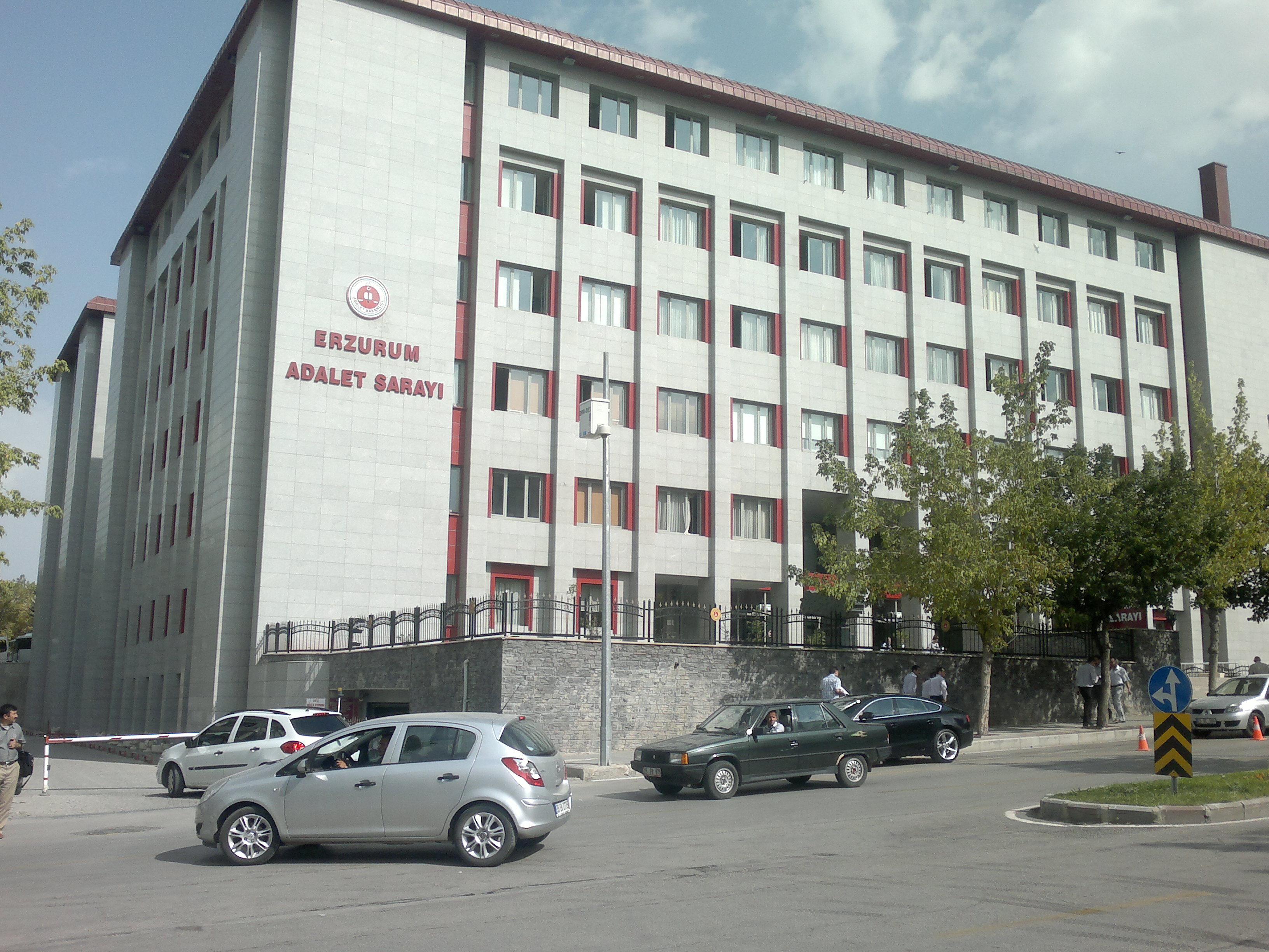 Erzurum Adalet Sarayı.